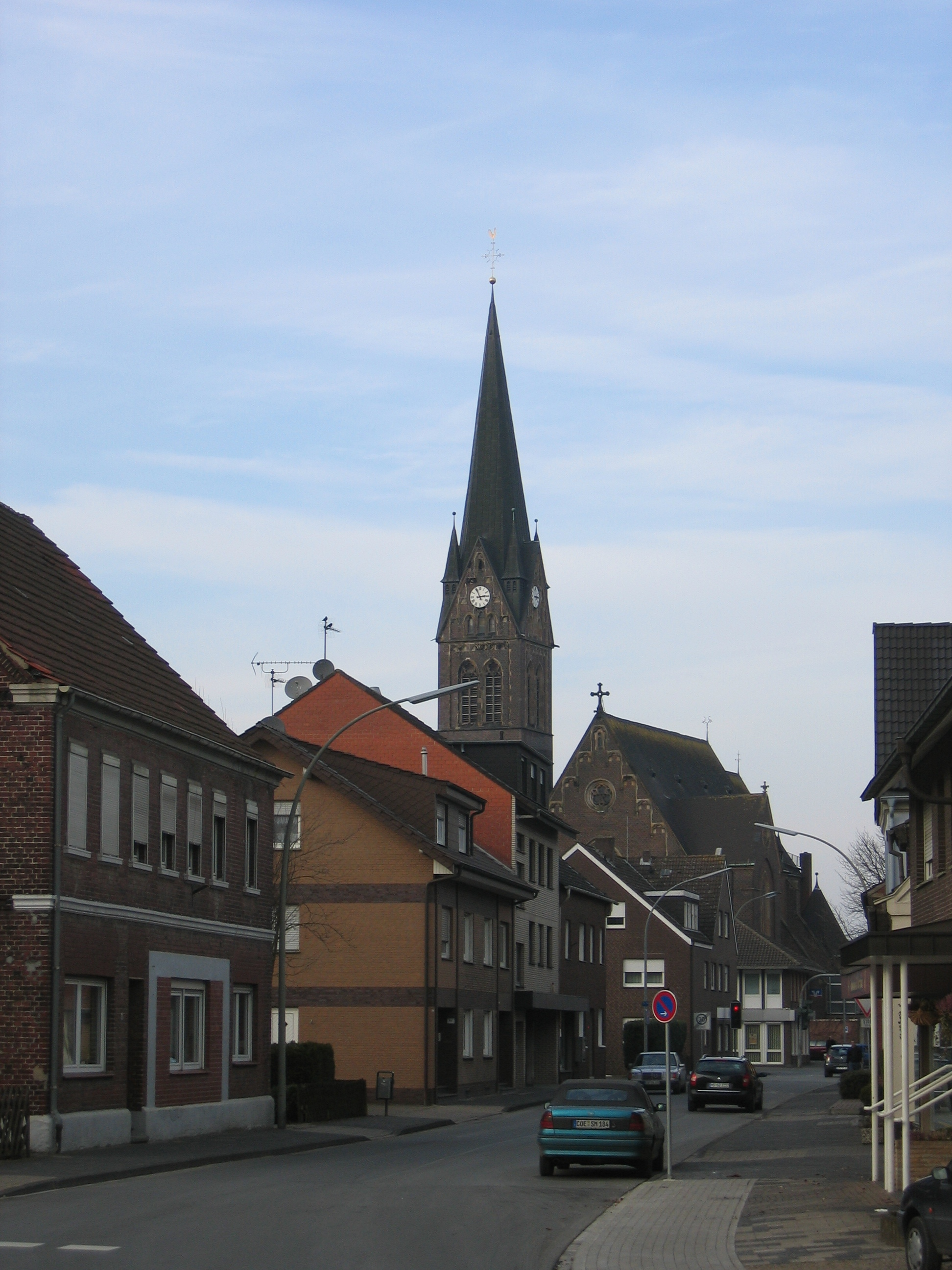 Ortskern von Buldern im Münsterland (mit Pfarrkirche)